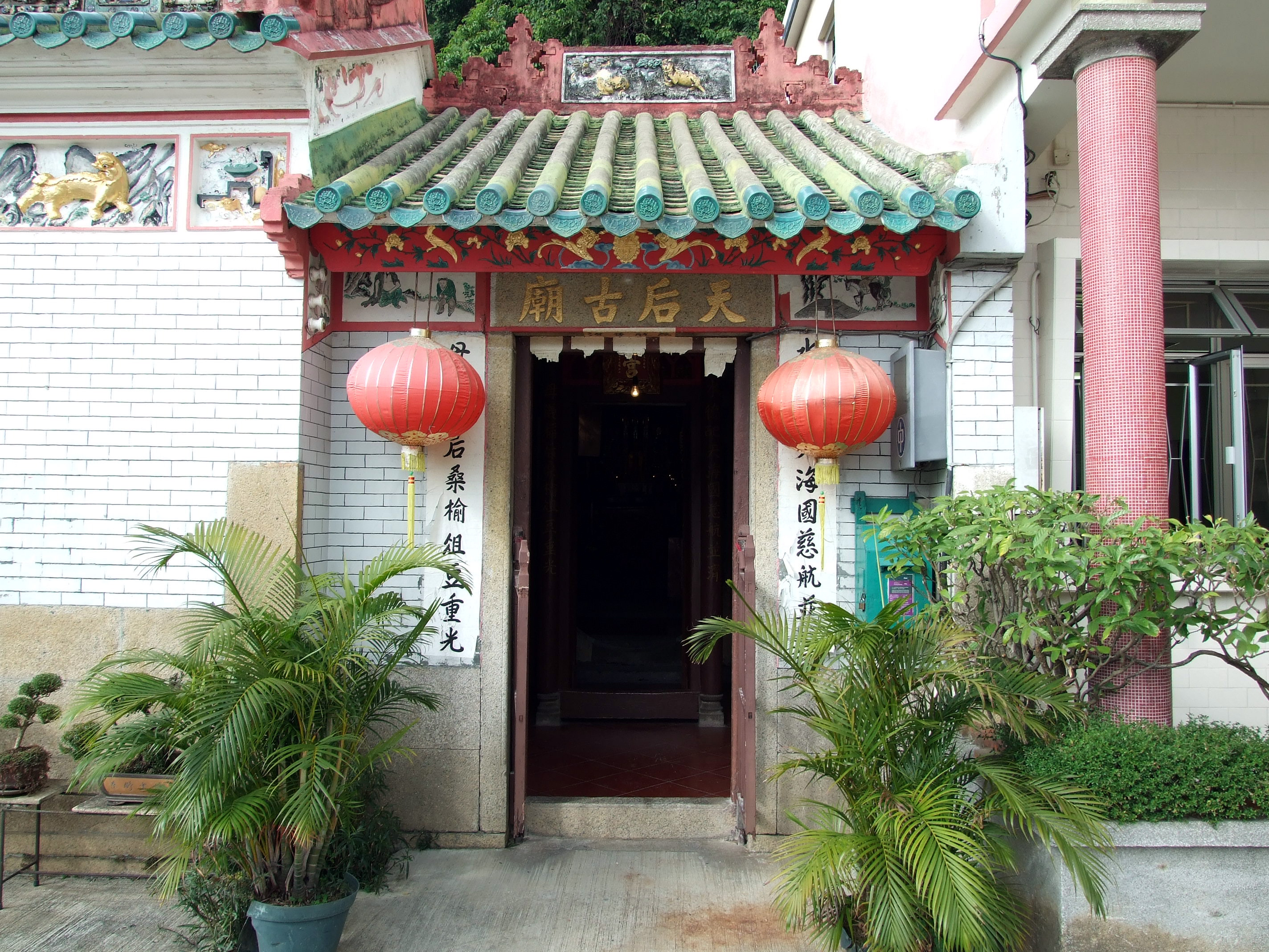 中文（香港）: 大澳天后古廟